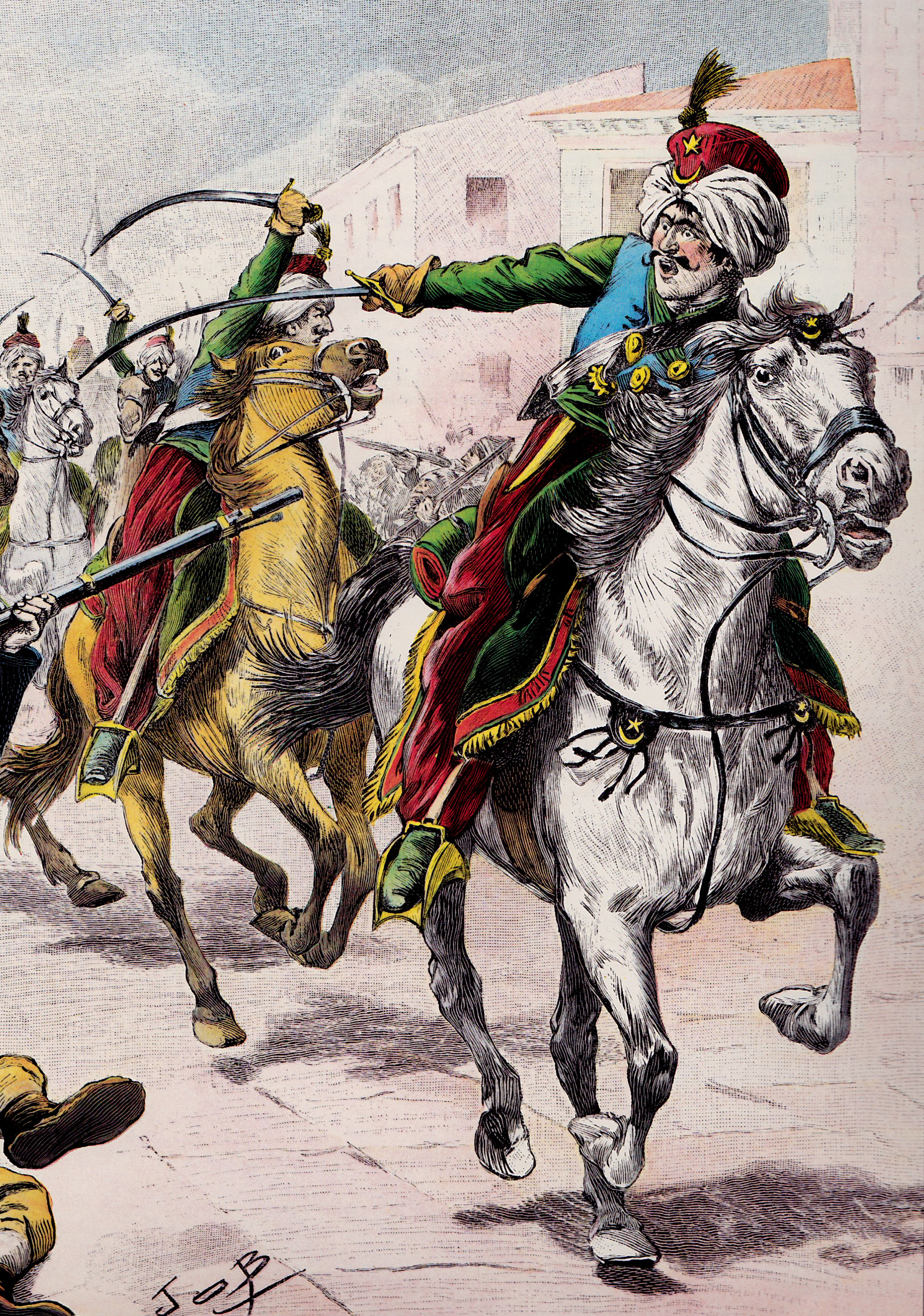 Charge des Mamelouks de la Garde impériale dans les rues de Madrid lors du soulèvement du Dos de Mayo (2 mai 1808).